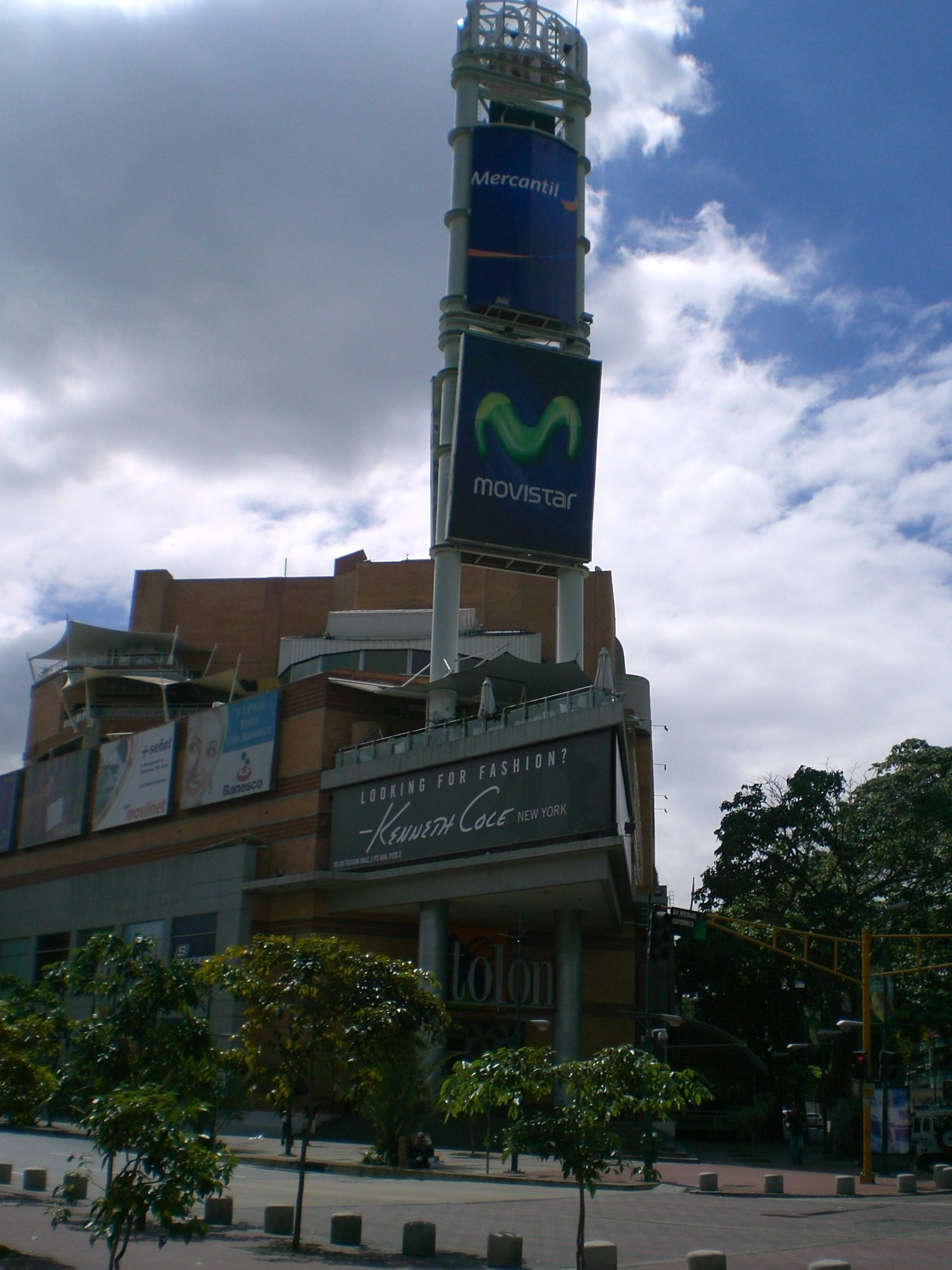 Tolón Mall, Baruta Municipality, Caracas.